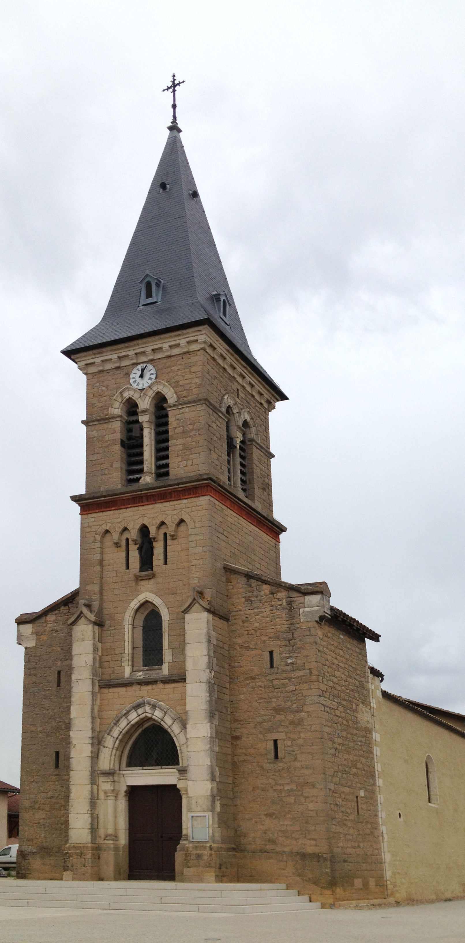 Église Saint-Pierre de Rancé (Ain).